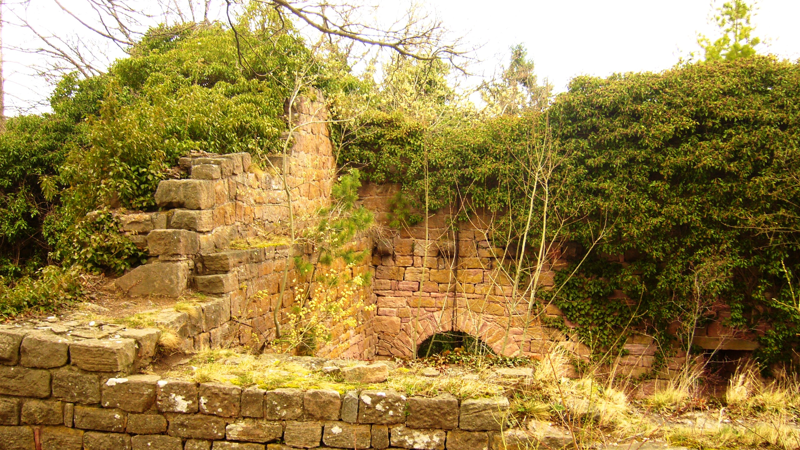 Une partie des ruines du Dagsbourg